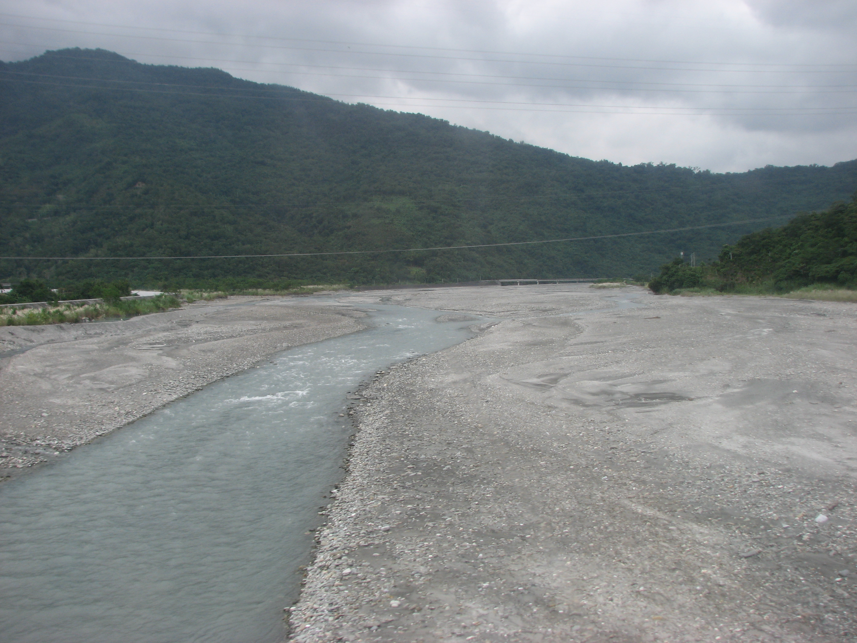 拉庫拉庫溪